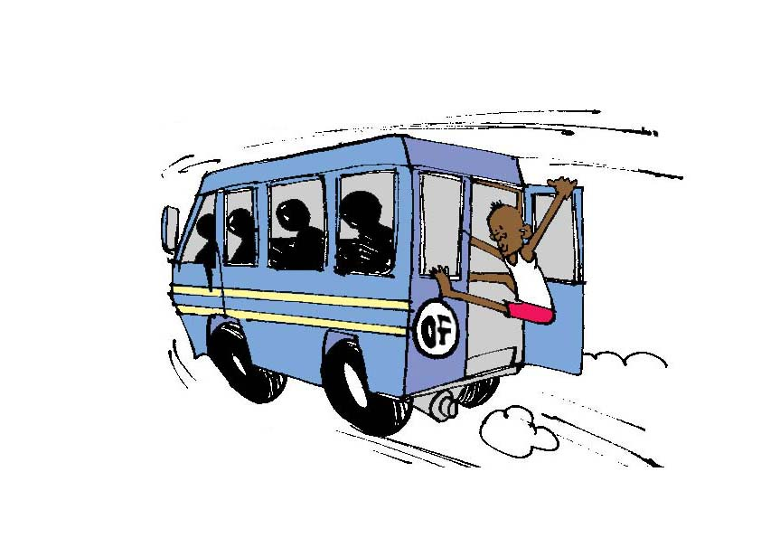 Gbaka, mini bus